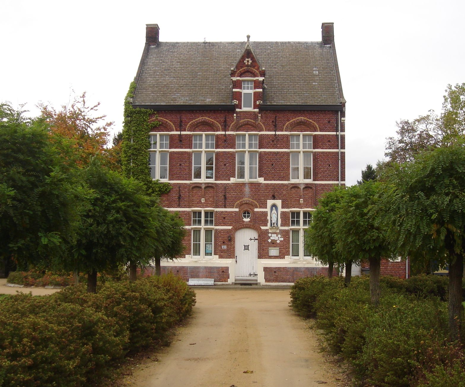 Pastorie in neogotische stijl in de St.-Jozefslaan 89, 2400 Mol-Wezel, BE.